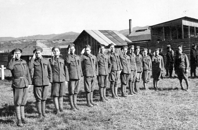 הגדוד השישי, שיאסטי פרפור Siesty Prapor יחידת עבודה במסגרת הצבא הסלובקי עד קייץ 1943. המשרתים ביחידה זו היו מוגנים בפני גירוש לפולין. מרבית המגויסים השתתפו במרד הסלובקי. התצלומים בזכות היותו של רפי צלם רשמי של הגדוד - רפי בנשלום